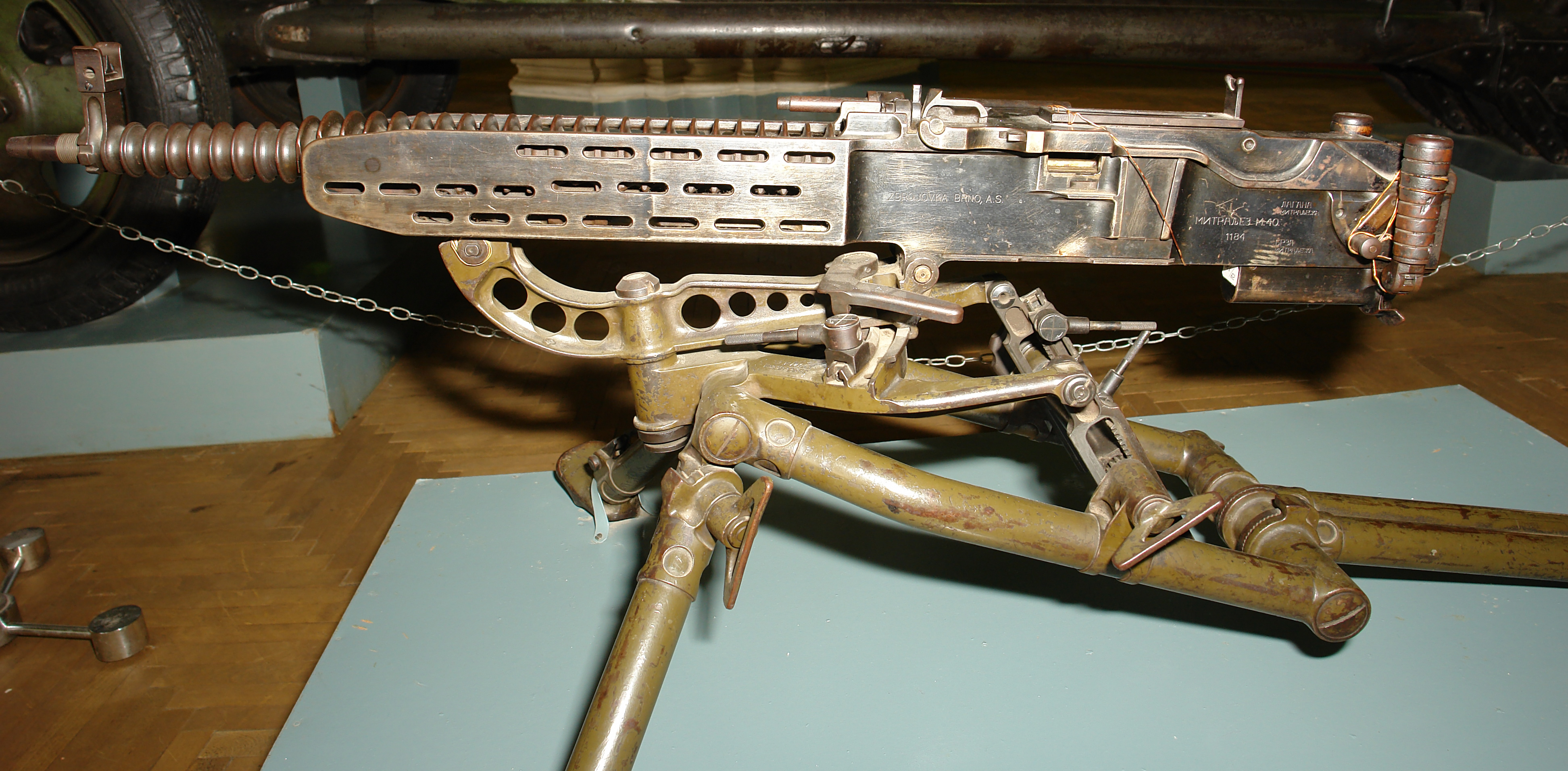 7,92-мм югославский станковый пулемет системы В. Холека обр. 1938/40 г. „Митральез М-40", изготовленный в городе Брно (Чехословакия). Состоял на вооружении Народно-освободительной армии Югославии. Военно-исторический музей артиллерии, инженерных войск и войск связи, Санкт-Петербруг.